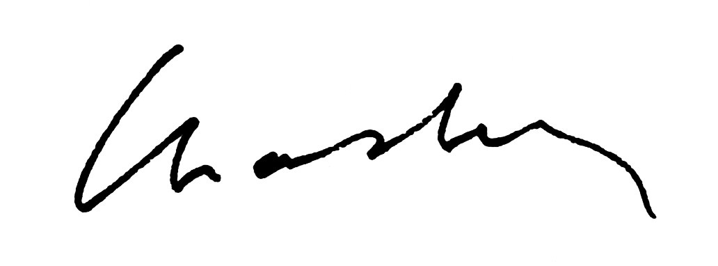 Signature du peintre Roger Chastel, scan d'après carton d'invitation. This signature is believed to be ineligible for copyright and therefore in the public domain because it falls below the required level of originality for copyright protection both in the United States and in the source country (if different). In this case, the source country (e.g. the country of nationality of the signatory) is believed to be France. Cette image ou le texte qui y est représenté est seulement composé de formes géométriques simples et de texte. Elle n’atteint pas le seuil d'originalité nécessaire pour la protection du droit d’auteur, et est donc du domaine public. See autographs of Magritte and Picasso